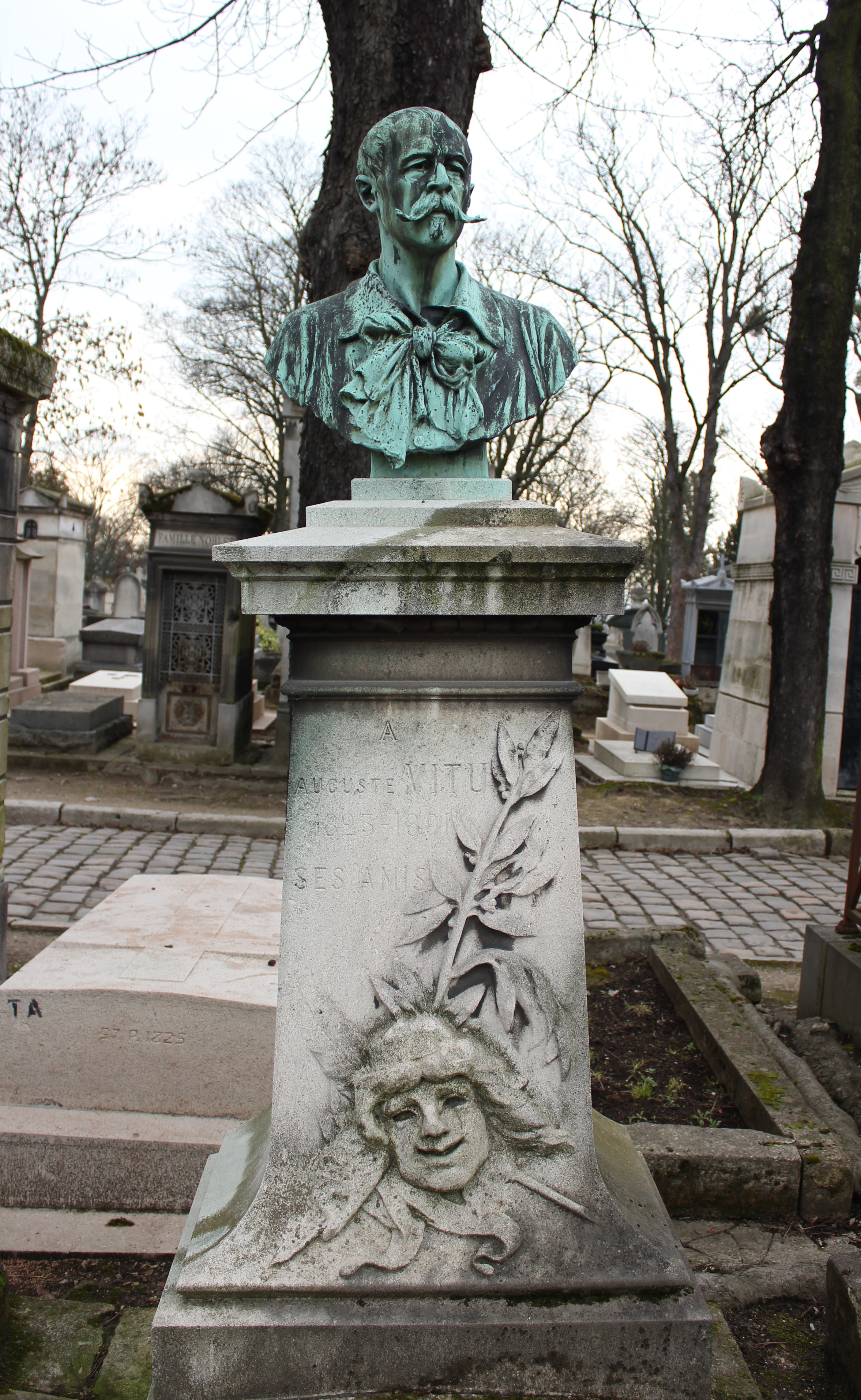 Sépulture d'Auguste Vitu (1823-1891), écrivain et journaliste ; son épouse et deux de ses filles. Tombe ornée d'un buste d'Auguste Vitu par Guilbert. Buste